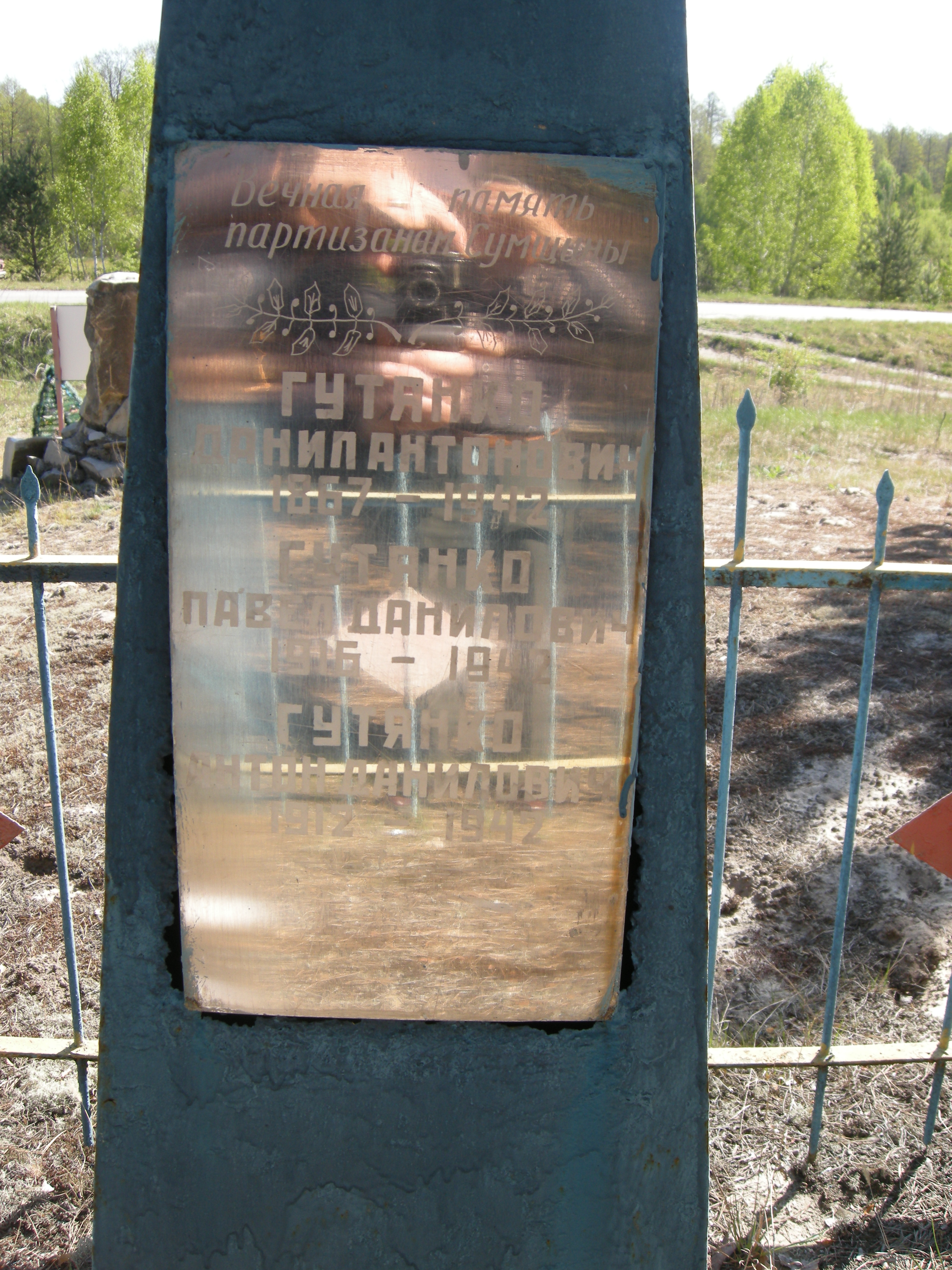 могили на місці хутора Каплиця